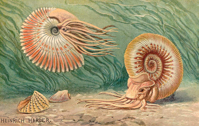 Ammonoid